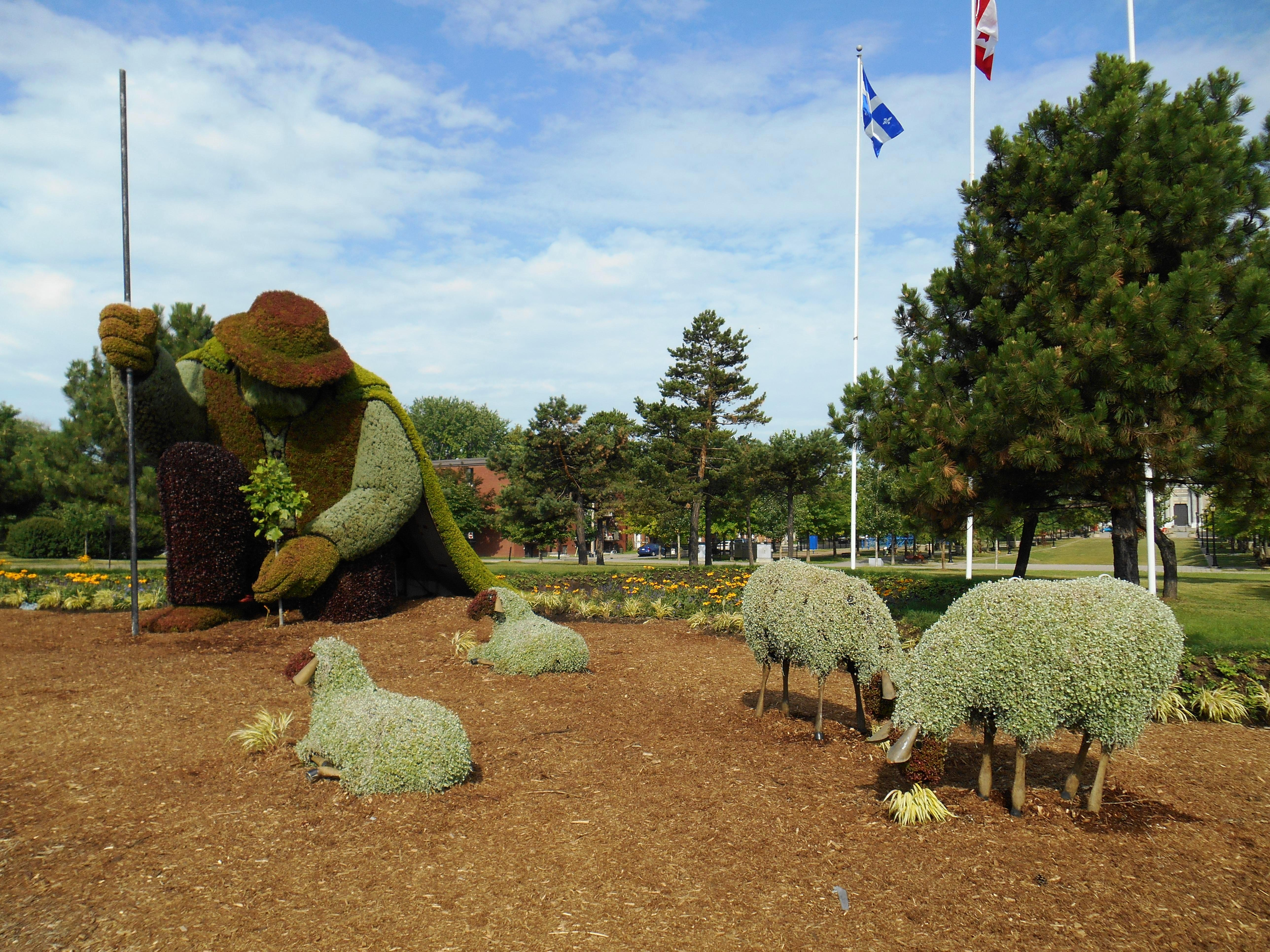 La mosaïculture L'Homme qui plantait des arbres, inspirée des dessins de Frédéric Back, au parc des Faubourgs, à Montréal.